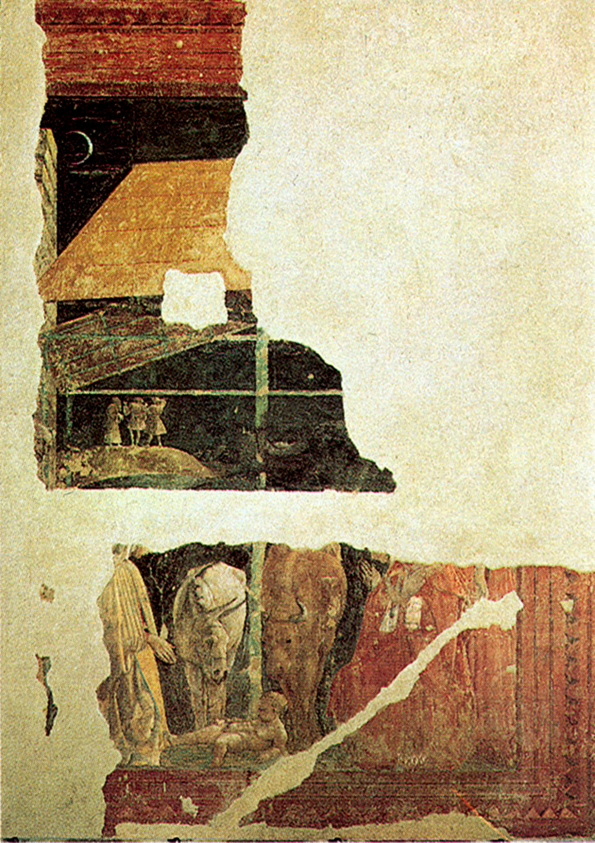 Adoration of the Child Paolo Uccello Fresco, 350 x 237 cm Bologna, San Martino Maggiore